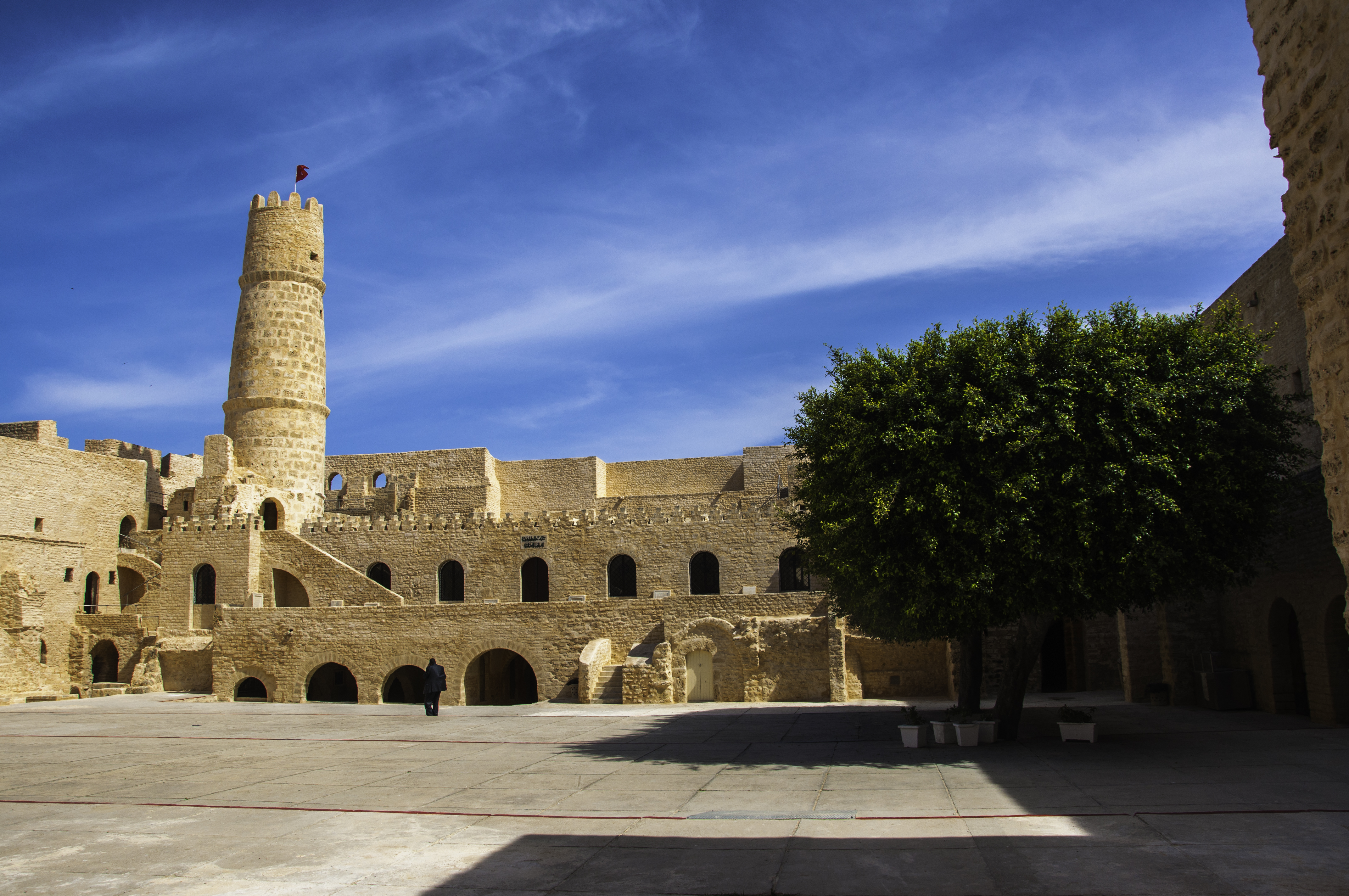 Kasba